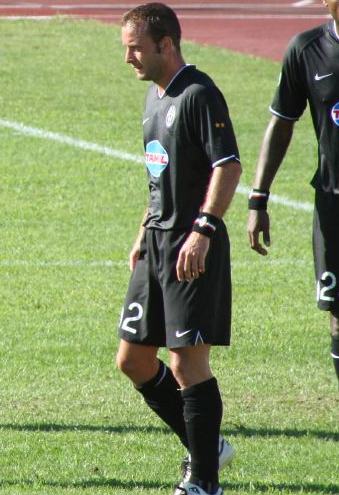 Il calciatore italiano Alessandro Birindelli in Rimini — Juventus (1-1), 1ª giornata del campionato italiano di Serie B 2006-07.